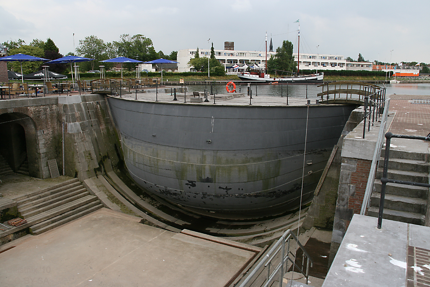 Hellevoetsluis - Droogdok Jan Blanken - Schipdeur in droog dok